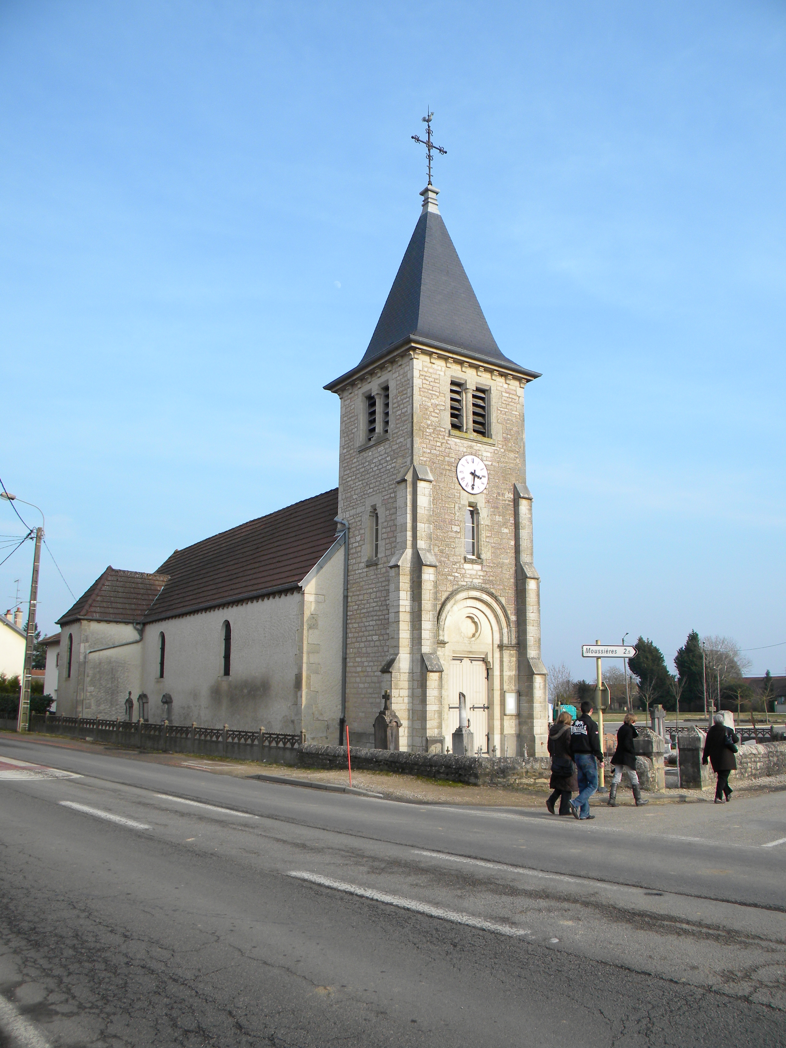 Kirko de Chemin